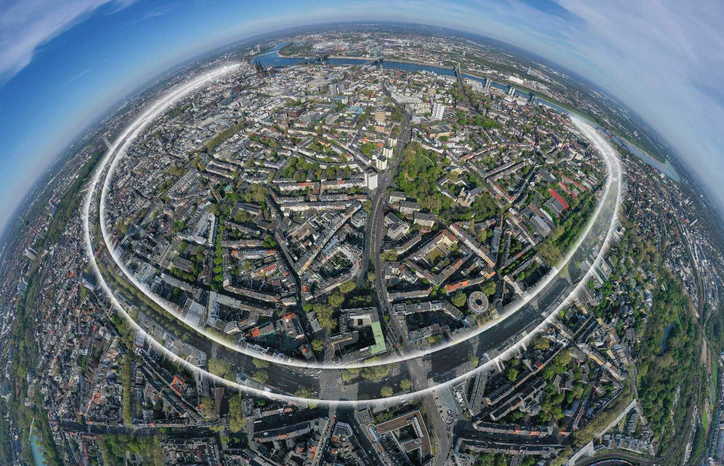 Die Ringe sind ein Gefüge von Straßen rund um das Zentrum von Köln. In diesem Little Planet Panorama aus der Luft ist direkt unten der Barbarossaplatz zu sehen.